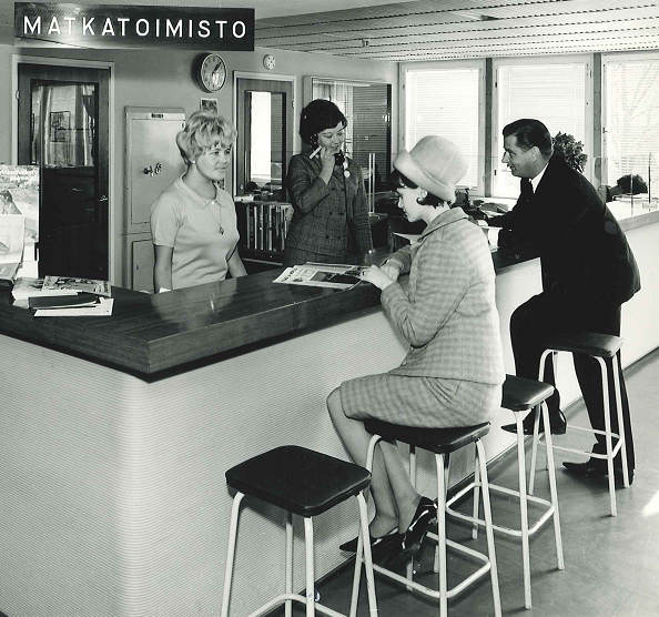 Snellmannin kadun toimisto